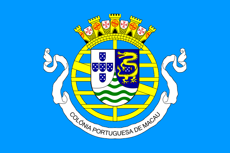 澳門殖民地旗